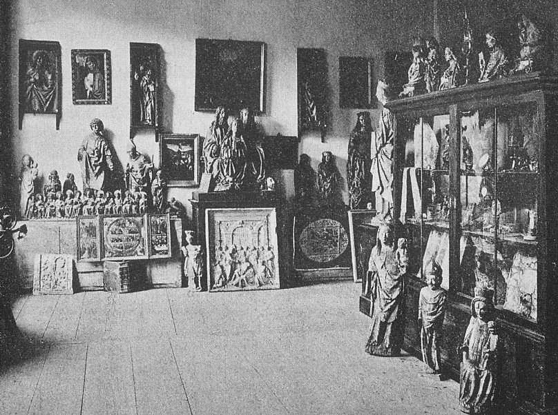 Kunstsammlung von Sebastaian Mutzl, Pfarrer in Enkering, Bistum Eichstätt. Postkarte um 1915/20